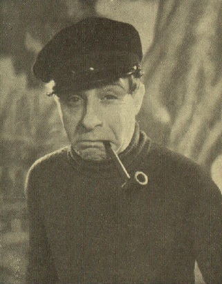 Fotografía del actor español Miguel Ligero caracterizado para su papel en la película Rumbo al Cairo.